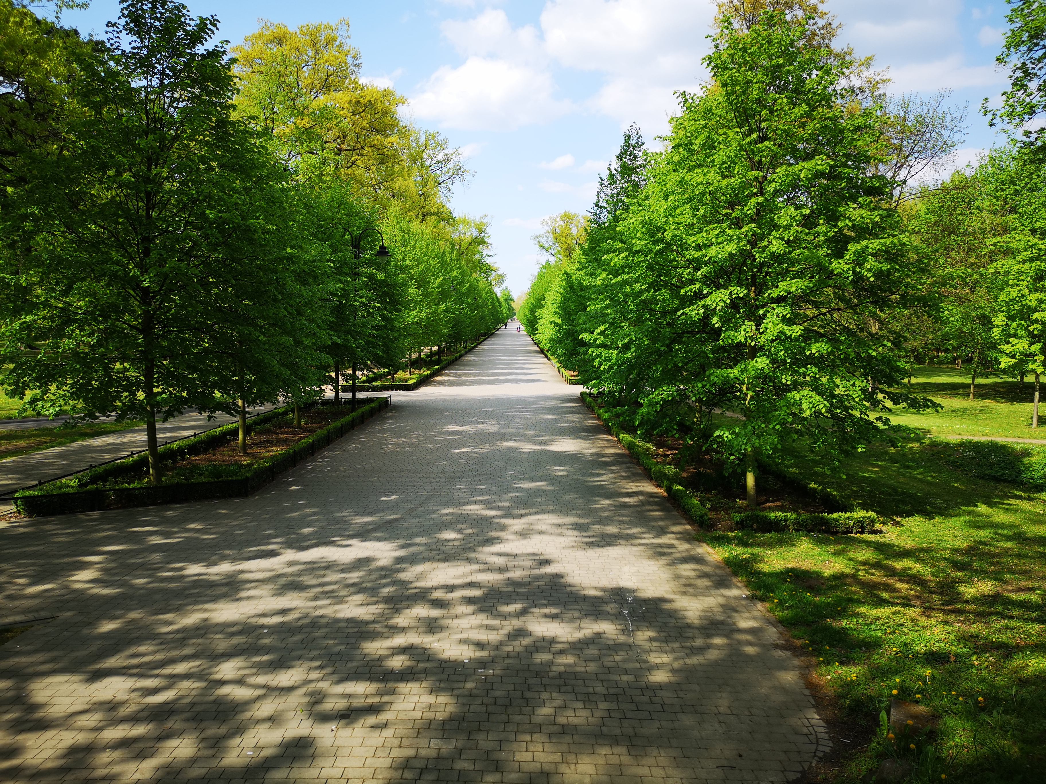 Aleja Orla Białego w legnickim Parku Miejskim.